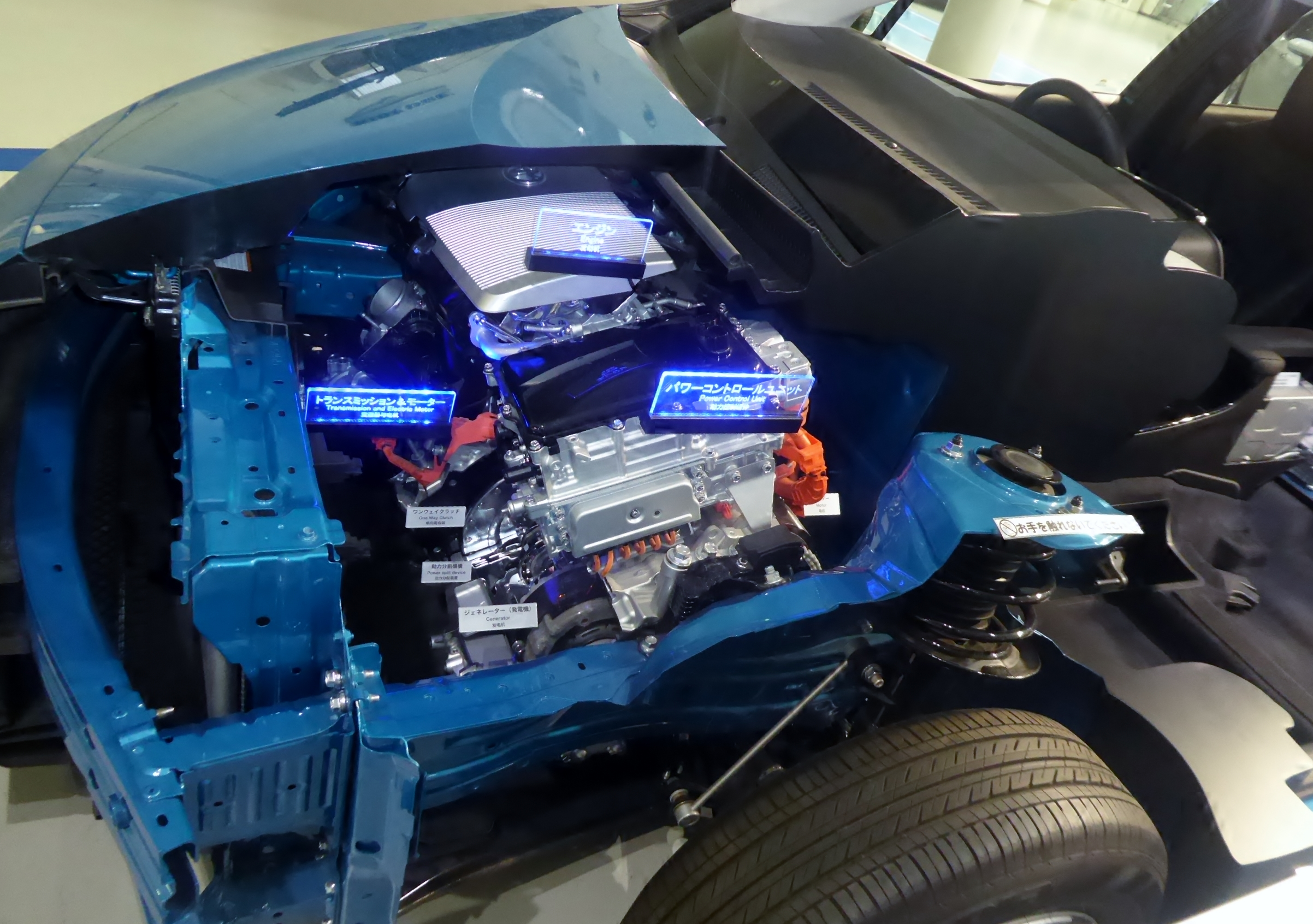 DLA-ZVW52型トヨタ・プリウスPHVのプラグインシステムを撮影。